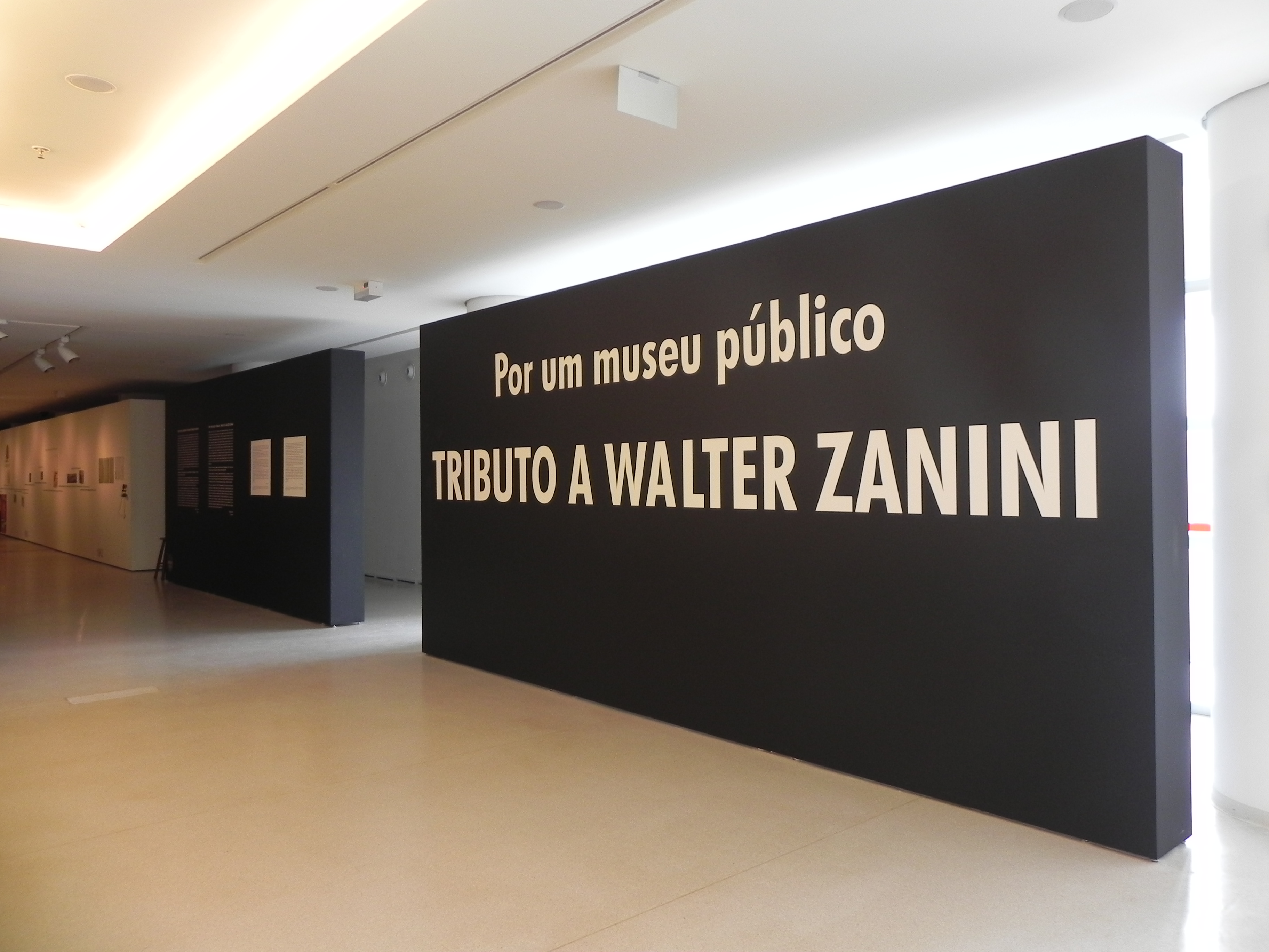 Em diagonal, painel em cor escura com o título da exposição em letras brancas.